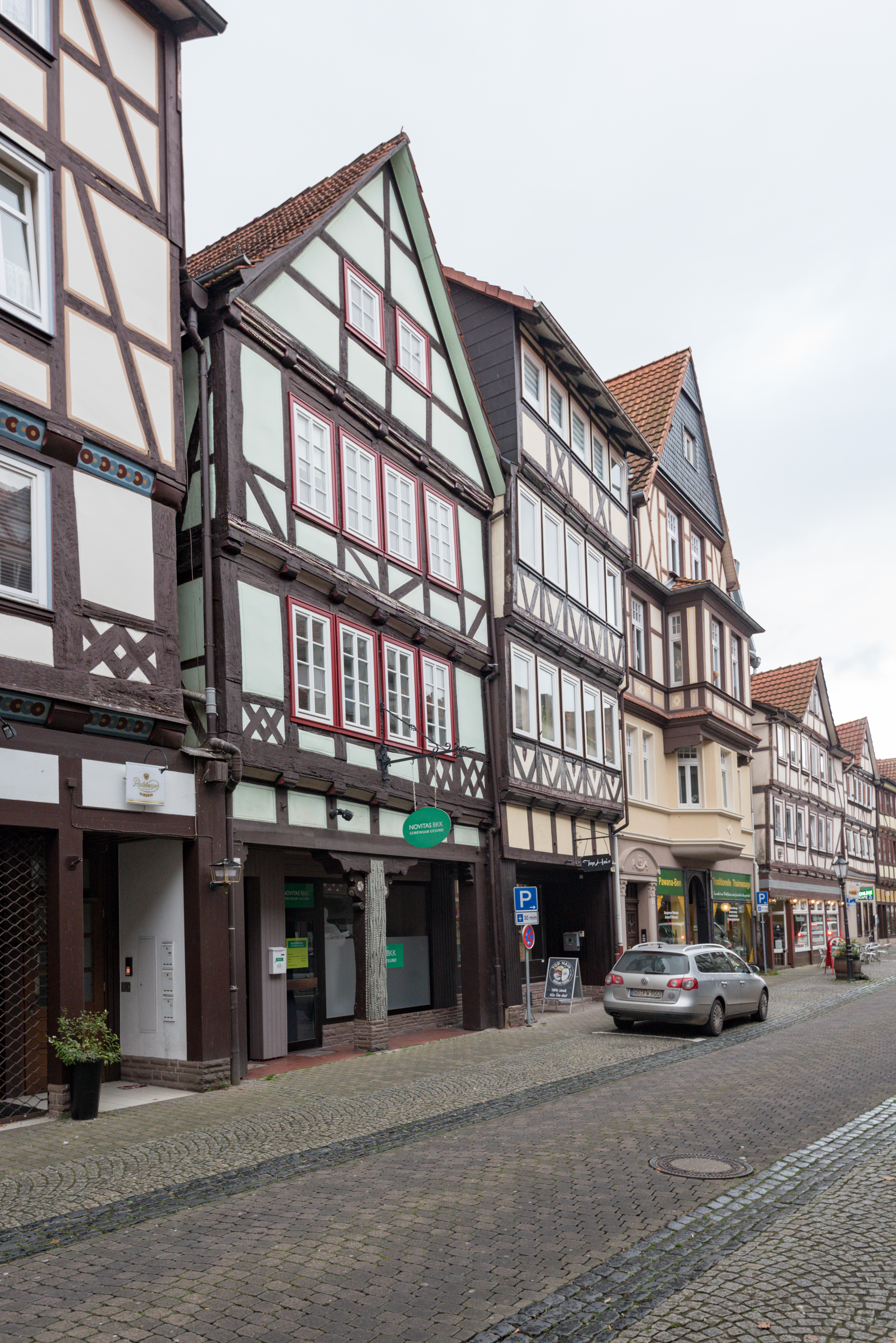 Hann. Münden, Burgstraße 11, 13, 15; das Haus Nummer 13 (drittes von links) war früher mit der Bezeichnung Haus Nummer 111 das Wohnhaus der Familie von Ernst August Pardey.